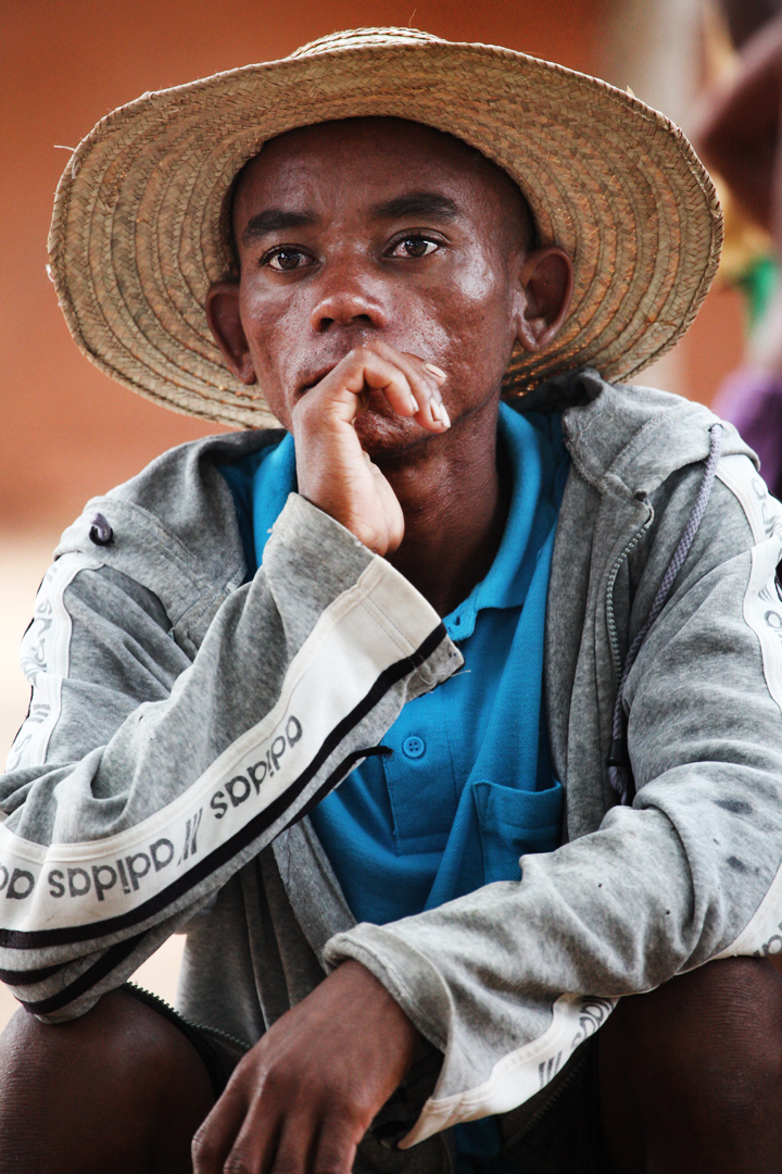 0004 Madagascar